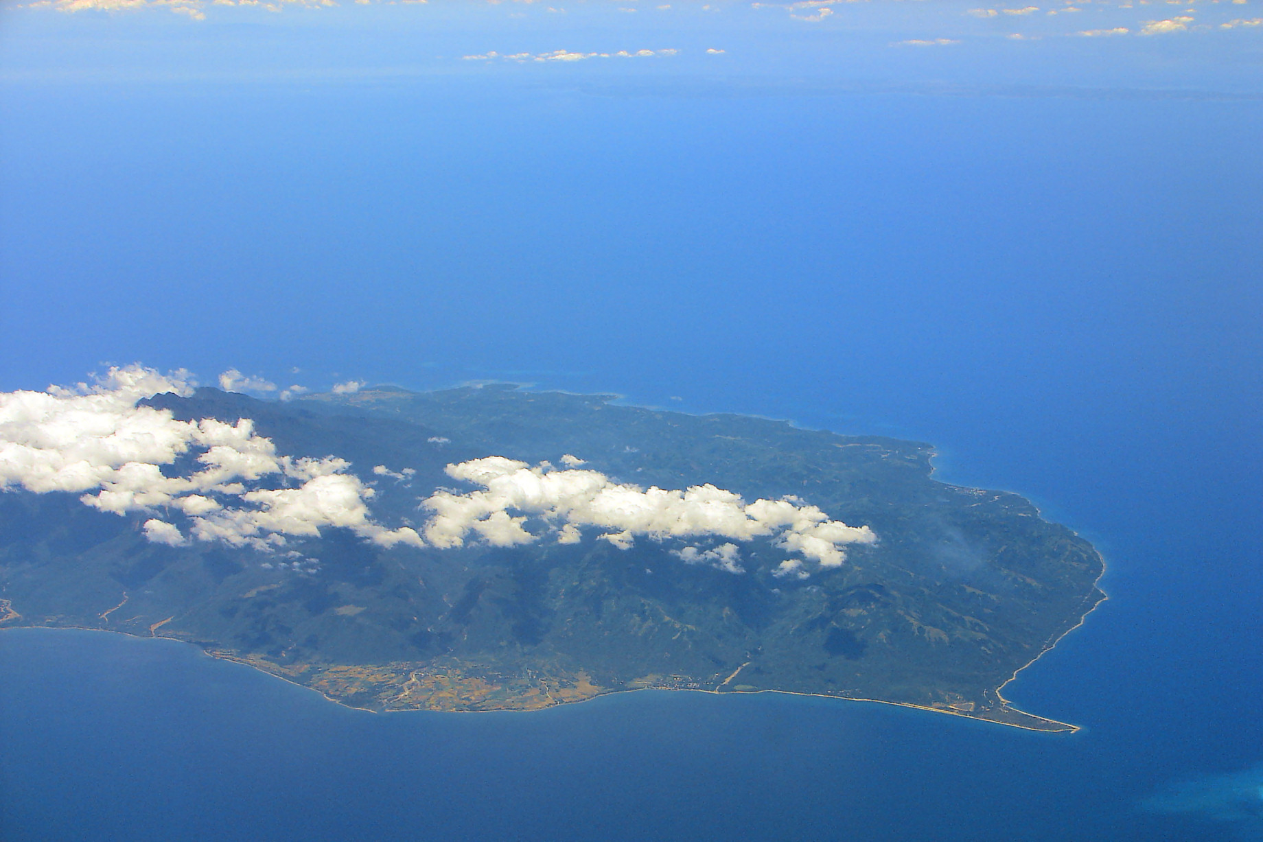 Sibuyan Island, Romblon, Philippines